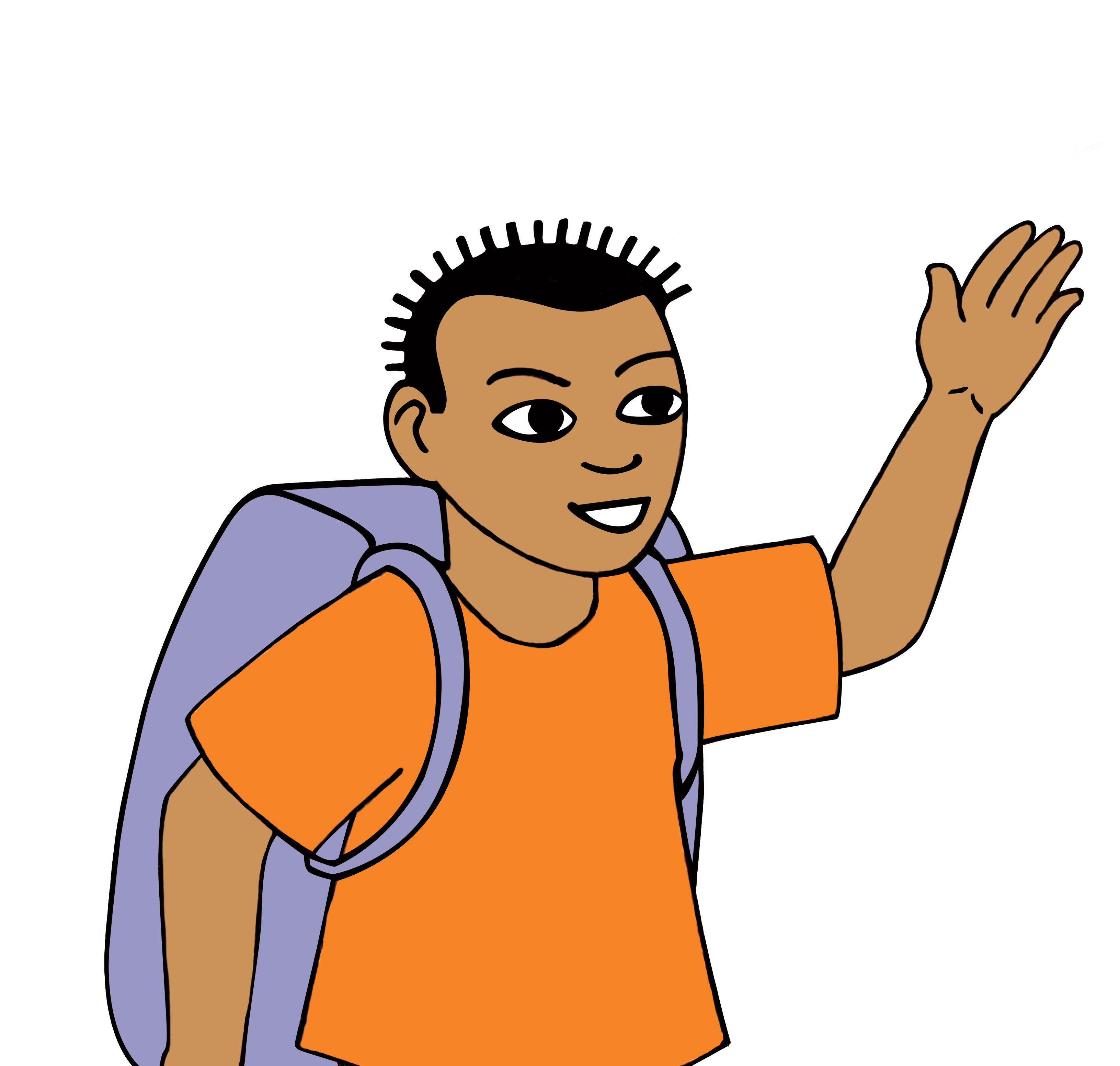 Matapan